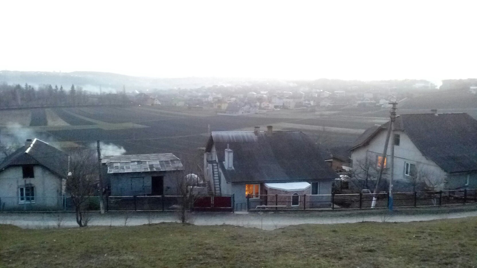 будинки центральної частини села на вул Л. Українки 73-77